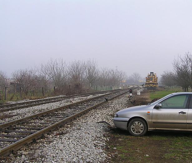 Hrvatske Željeznice Paneuropean Koridor 10 track join from Županja